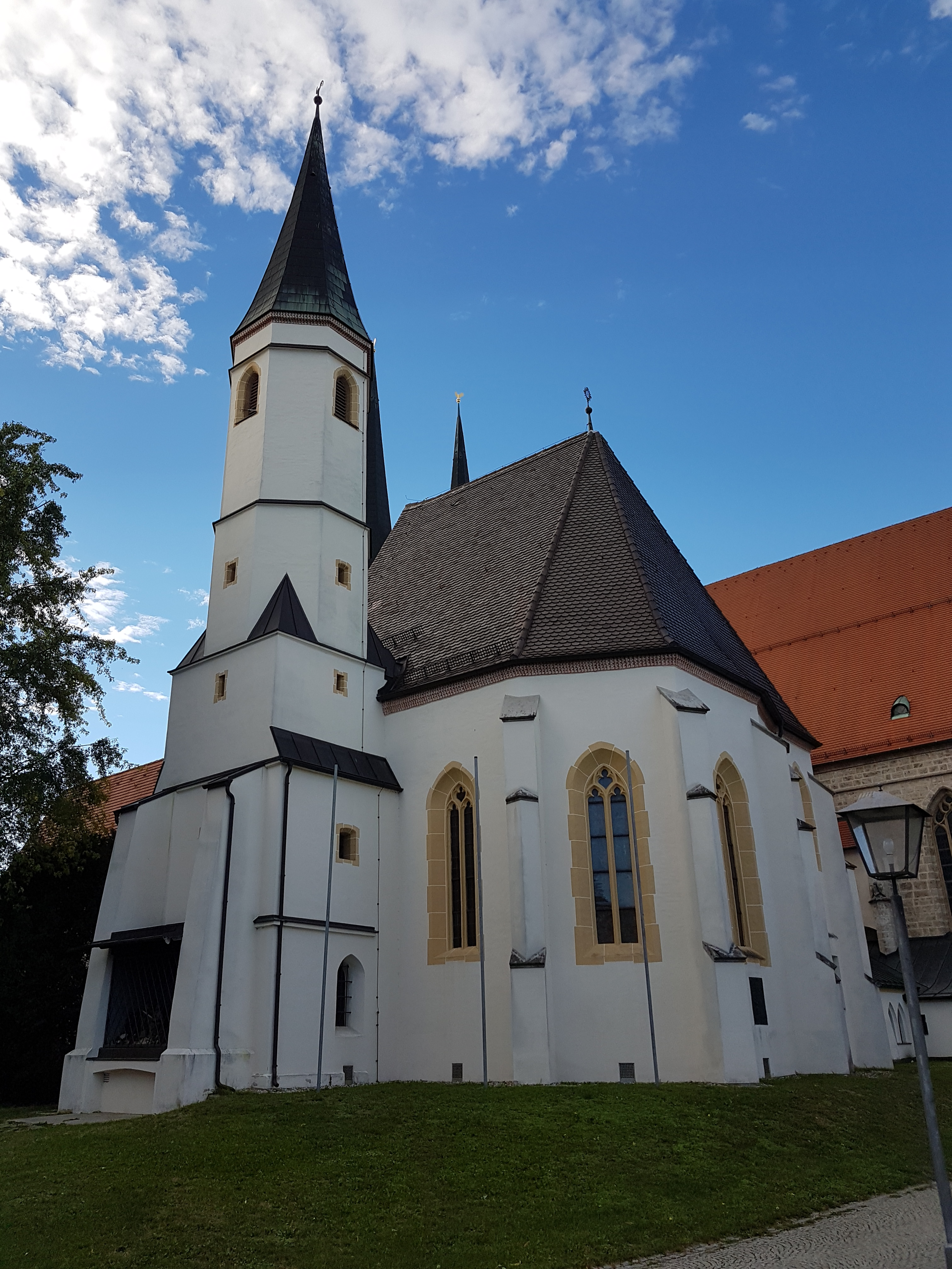 Augustiner-Chorherrenstift Altötting